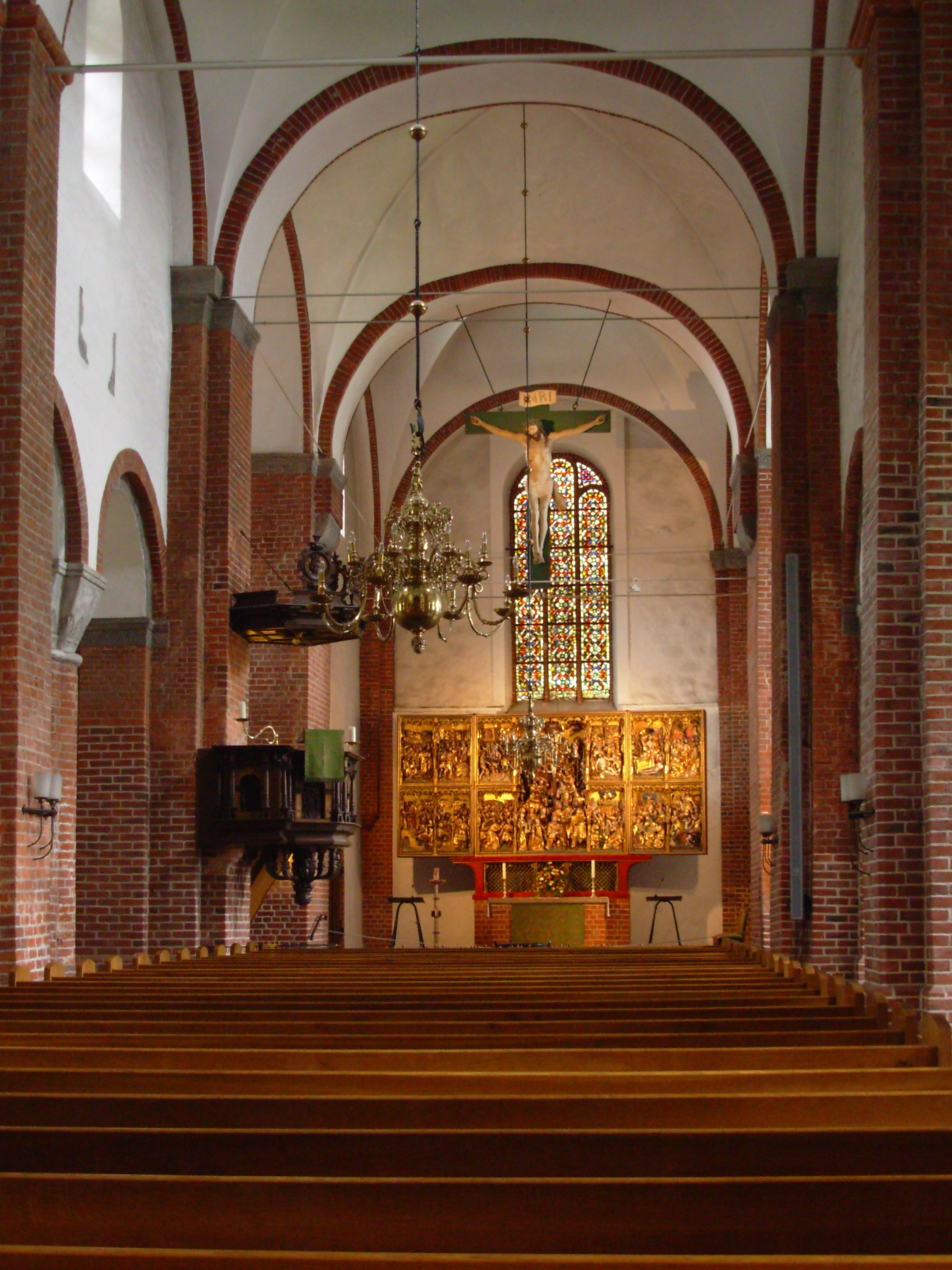 Mittelschiff der Marienkirche Segeberg